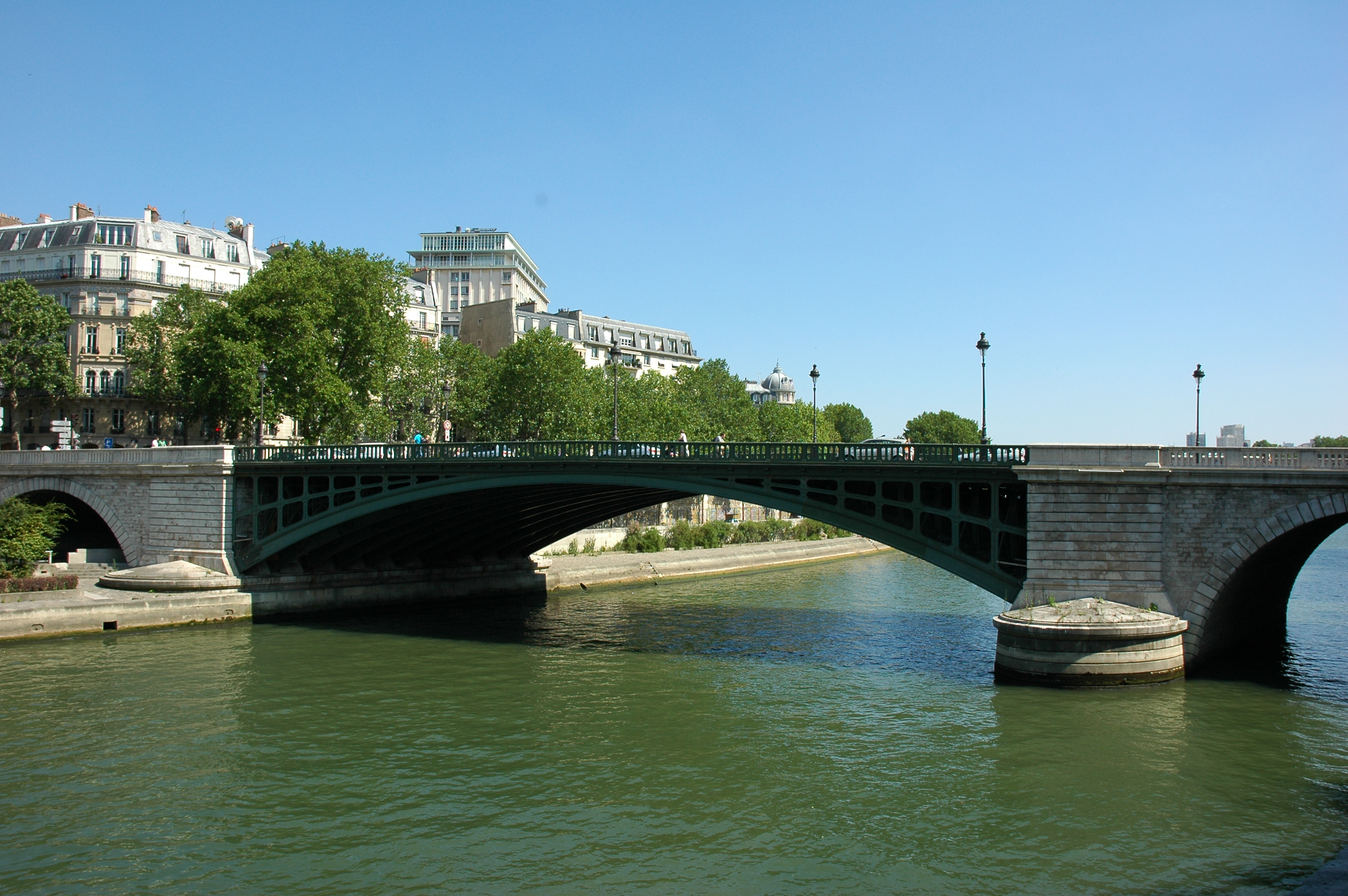 Vue partielle de la section nord du Pont de Sully, Paris, France. Photographie prise par Patrick GIRAUD